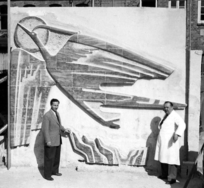 Odo Tattenpach: „Aufsteigender Phoenix“ von 1953, kurz vor der Auslieferung zur Montage im Eingangsbereich des Bundeshauses in Bonn, auf dem Firmengelände des Steinmetzbetriebes Heinrich Zerrries in Braunschweig (rechts Heinrich Zerries, links ein Mitarbeiter).